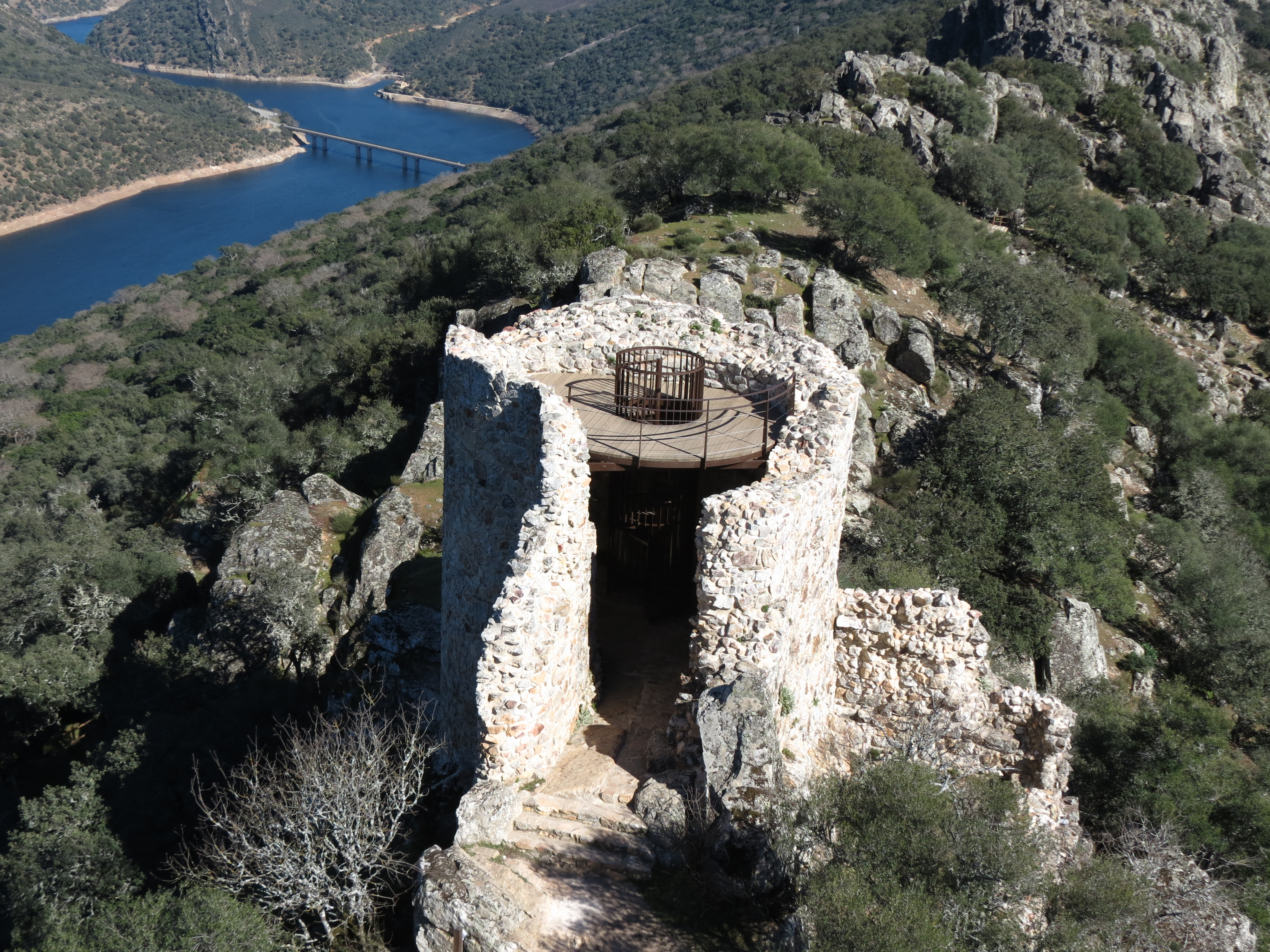 2ª Torre del castillo del parque nacional del Monfragüe